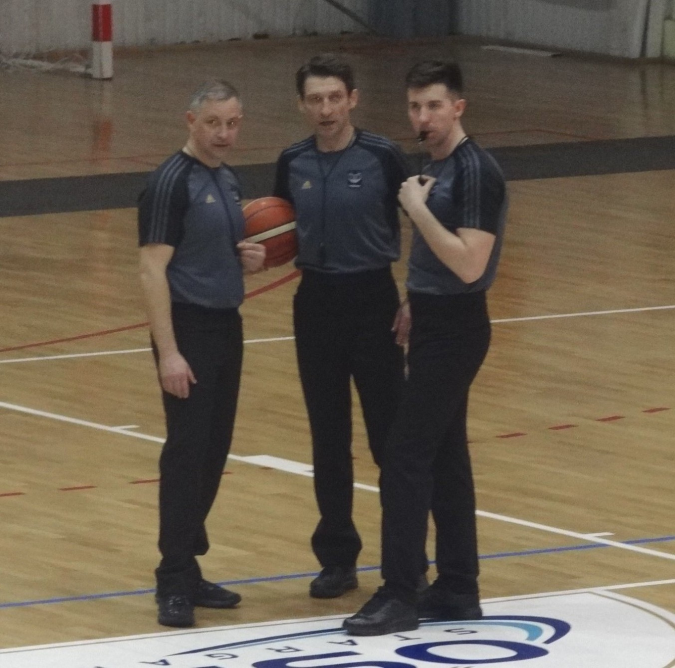 Sędziowie meczu Spójnia-Basket Poznań, 15.04.2018